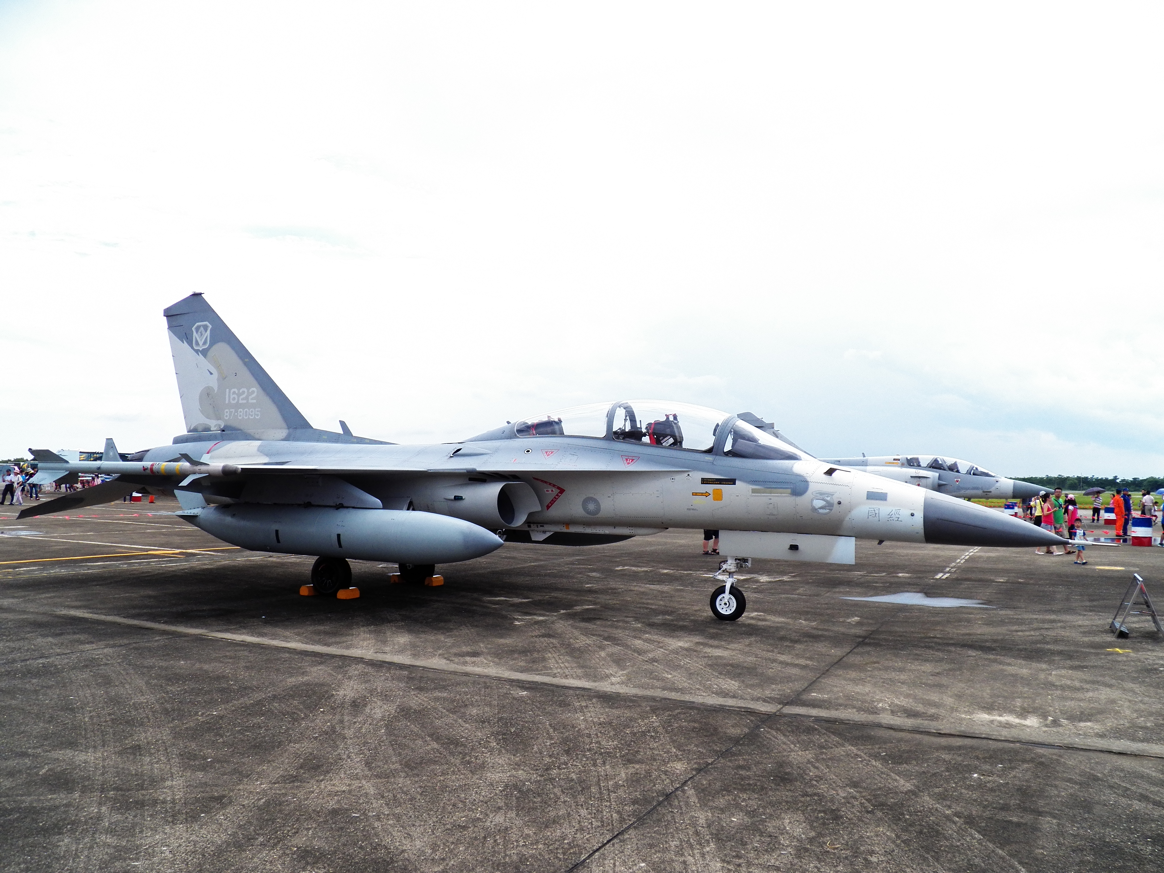 2012年空軍嘉義基地營區開放活動，左前方所見經國號複座型1622。